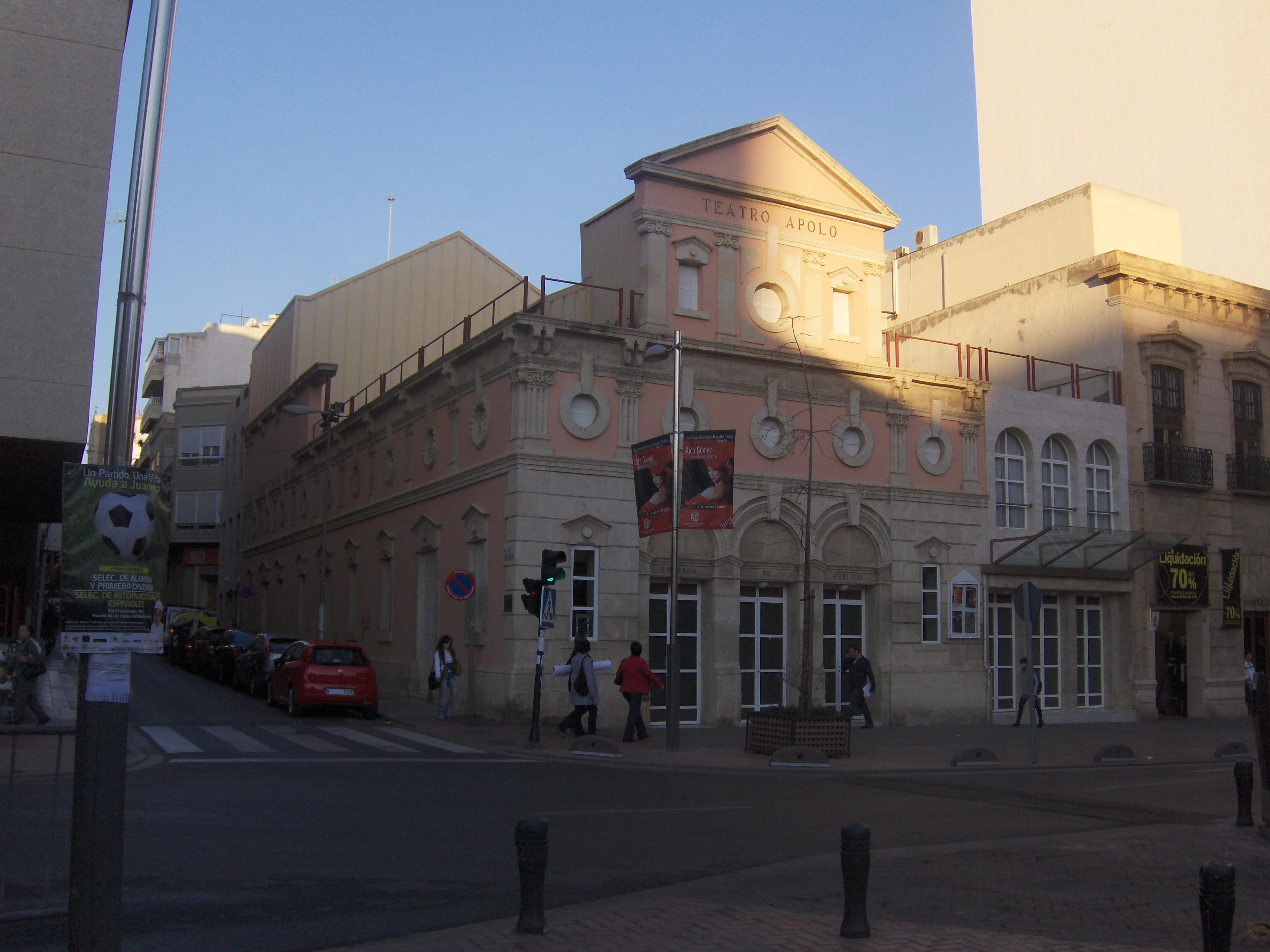 teatro Apolo de Almería